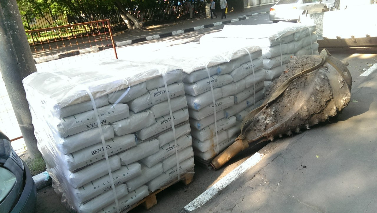 Используется при бурении горизонтальных тоннелей при ГНБ